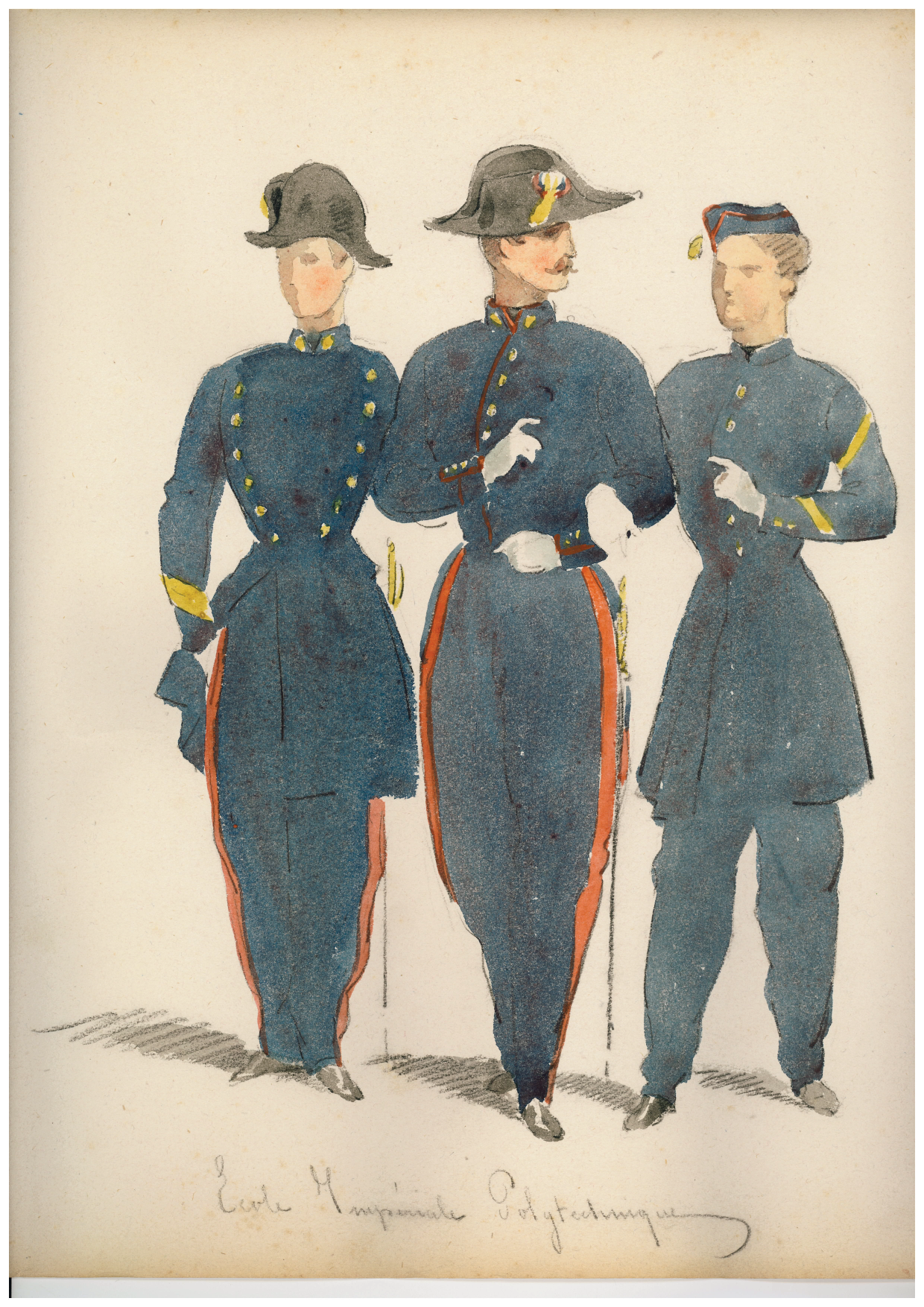 Aquarelle de polytechniciens en uniforme : Second Empire